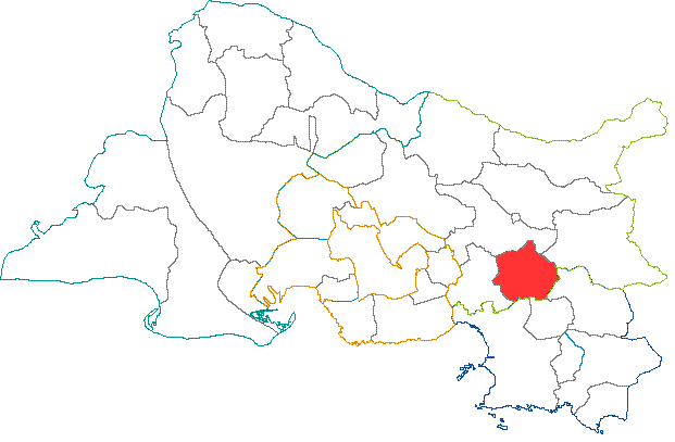 Situation du canton dans le département des Bouches du Rhône (France)